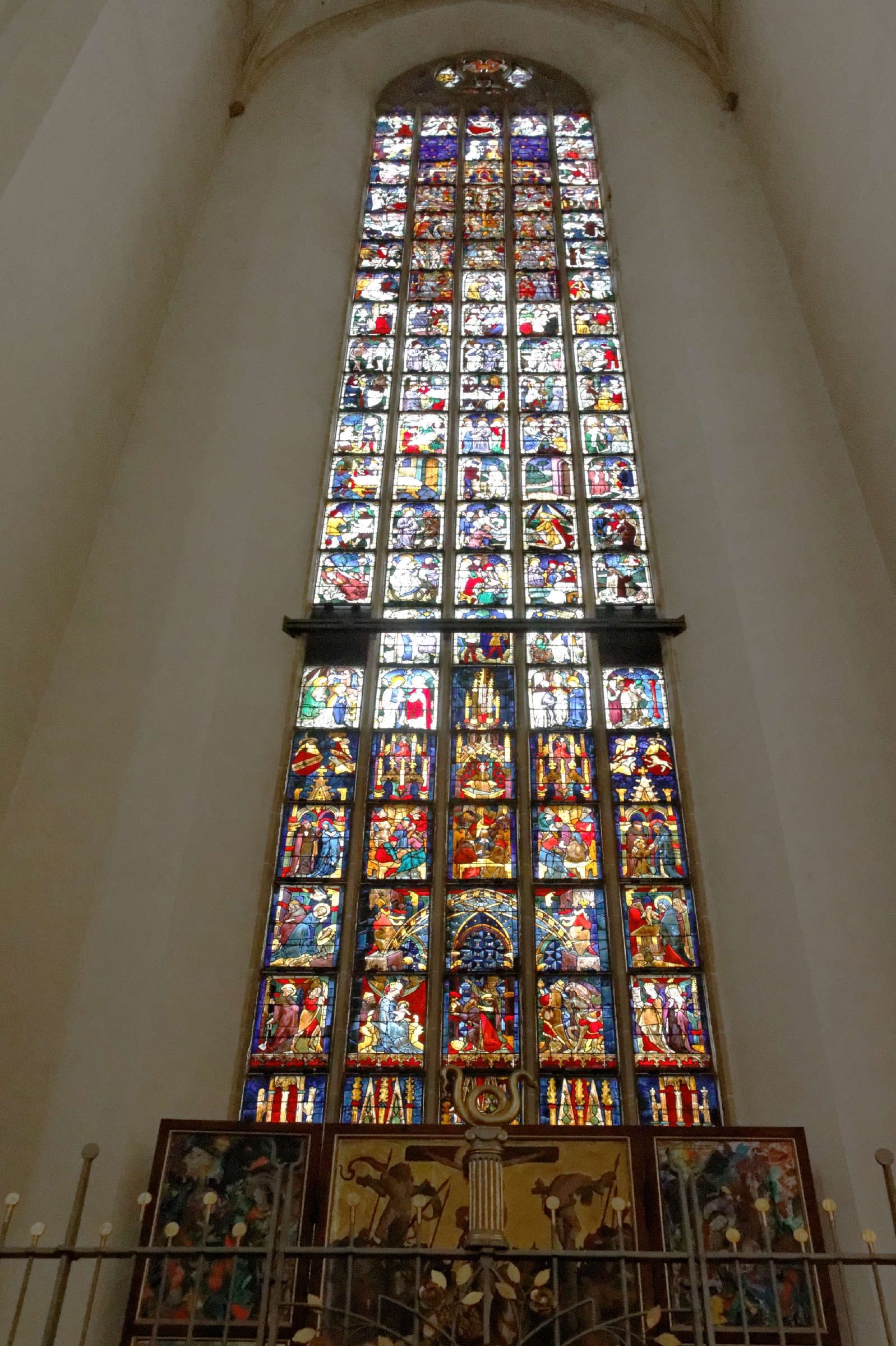 Speculumfenster in der Frauenkirche in München